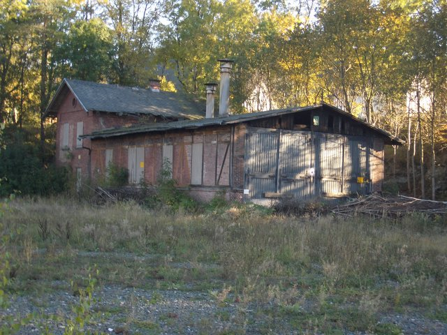 Der Lokschuppen im Marxgrün im Oktober 2005. Das Gebäude ist in sehr schlechtem Zustand.